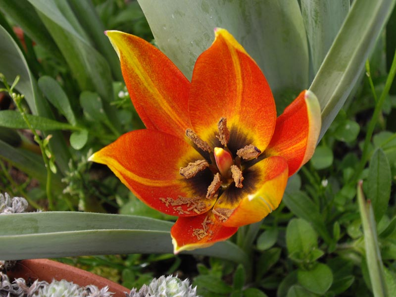 Tulipa whittallii (=Tulipa orphanidea subsp. whittalii)